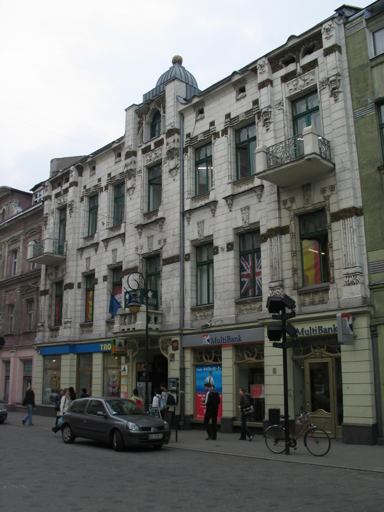 Kamienica Oszera Kohna przy Piotrkowskiej 43 w Łodzi, miejsce po byłej synagodze